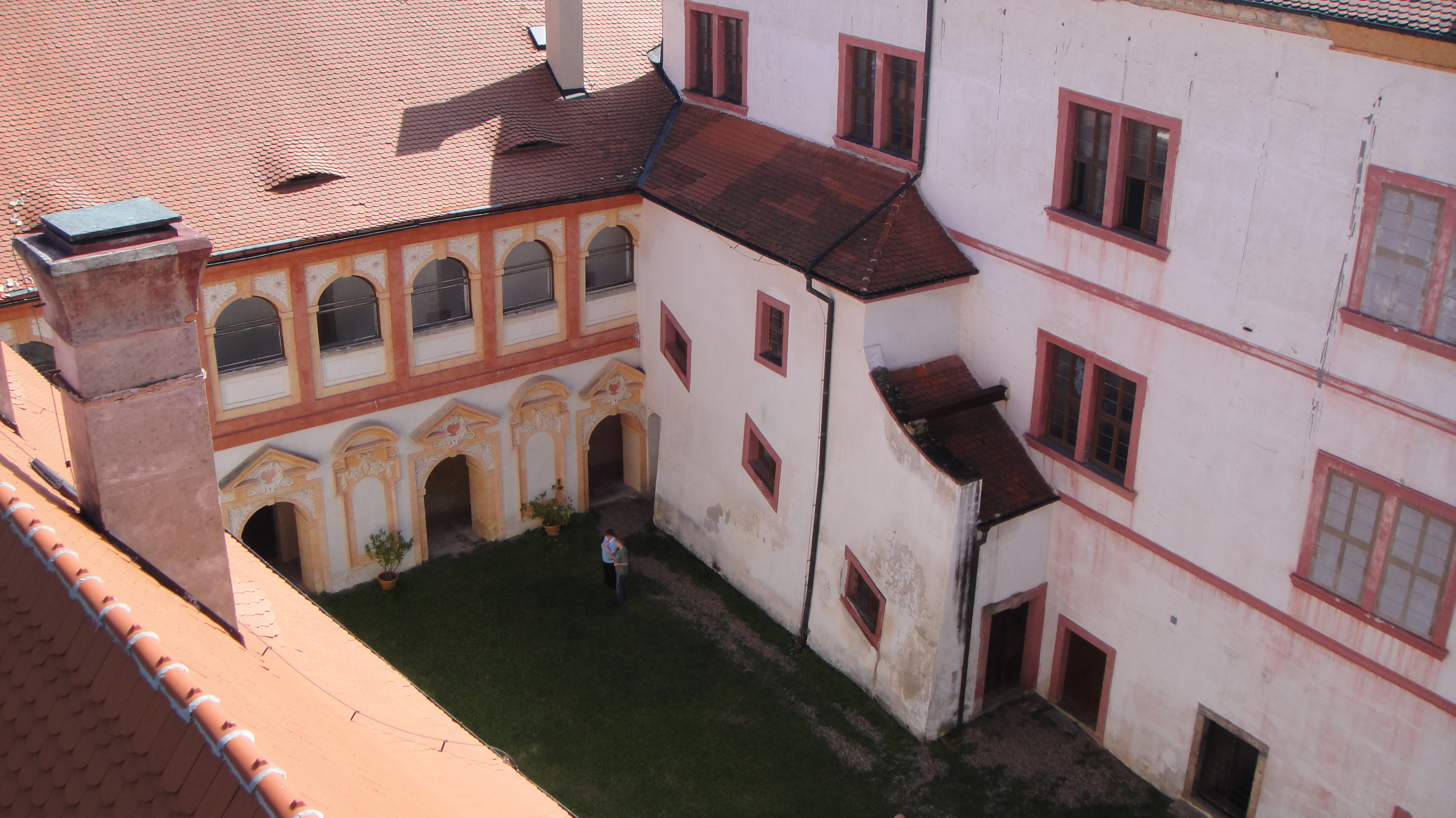 Třetí nádvoří Nového Hradu v Jimlíně.